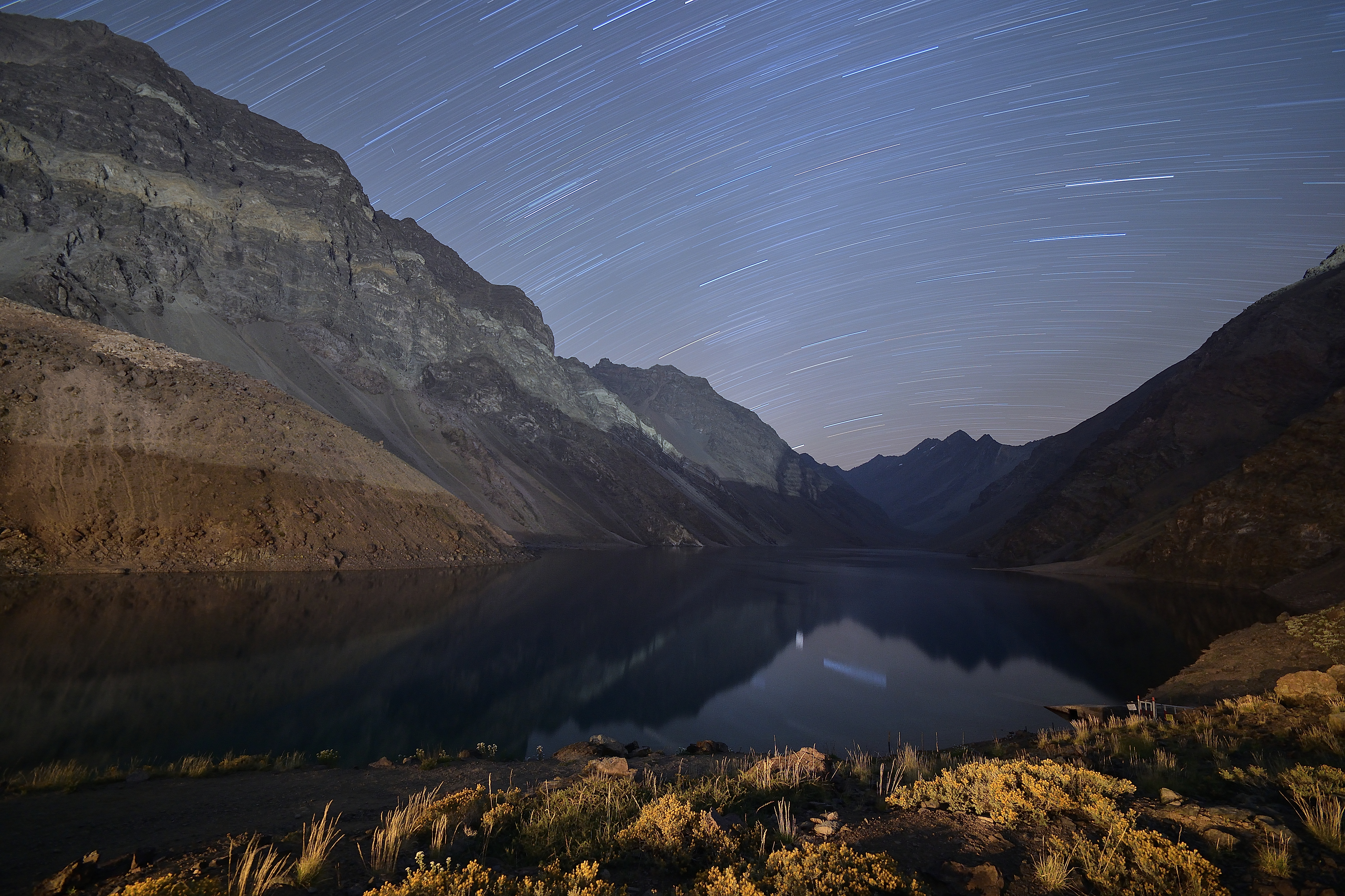 Laguna del Inca en modo Star trail